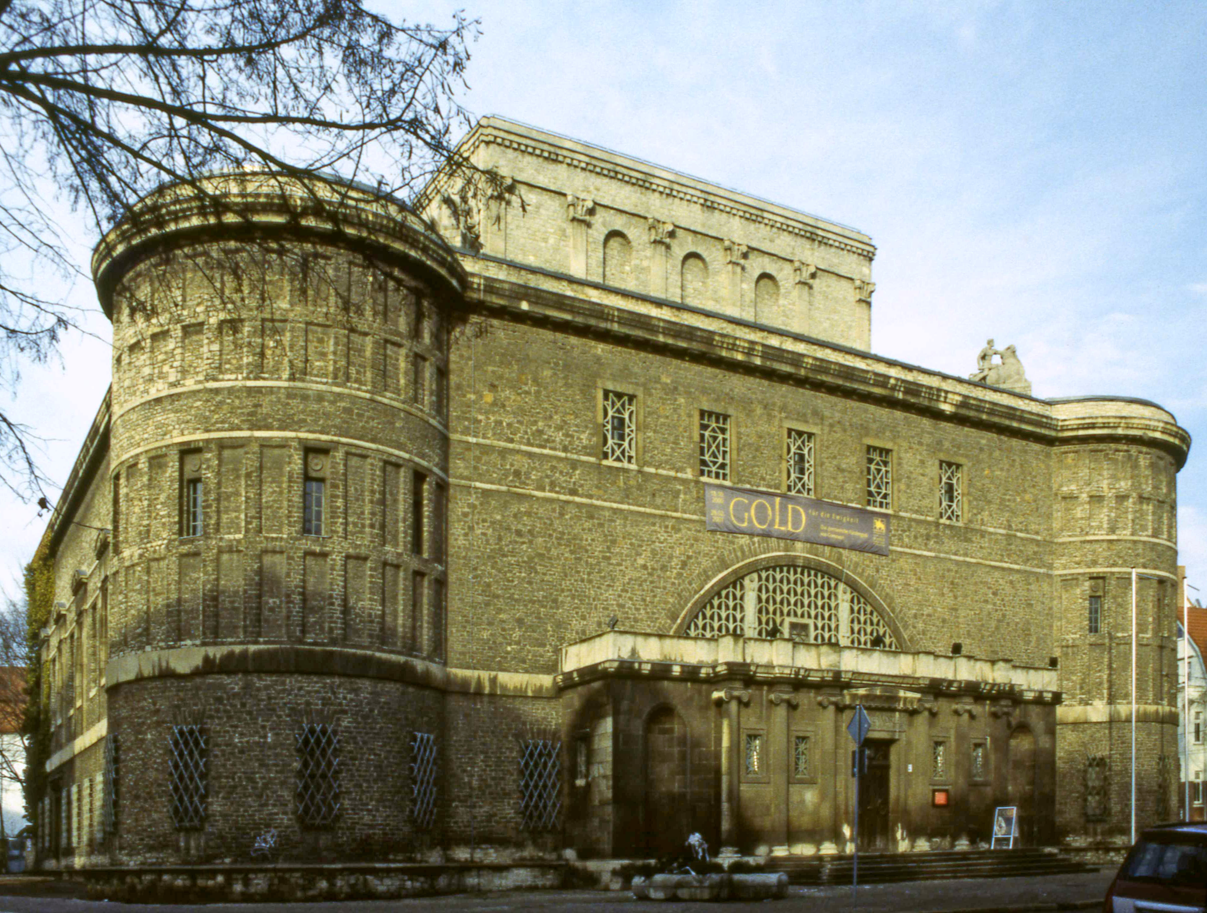 Landesmuseum für Vorgeschichte Sachsen-Anhalt, Richard-Wagner-Str. 9, Halle (Saale). Gleichzeitig Sitz des Landesamtes für Denkmalpflege und Archäologie Sachsen-Anhalt.